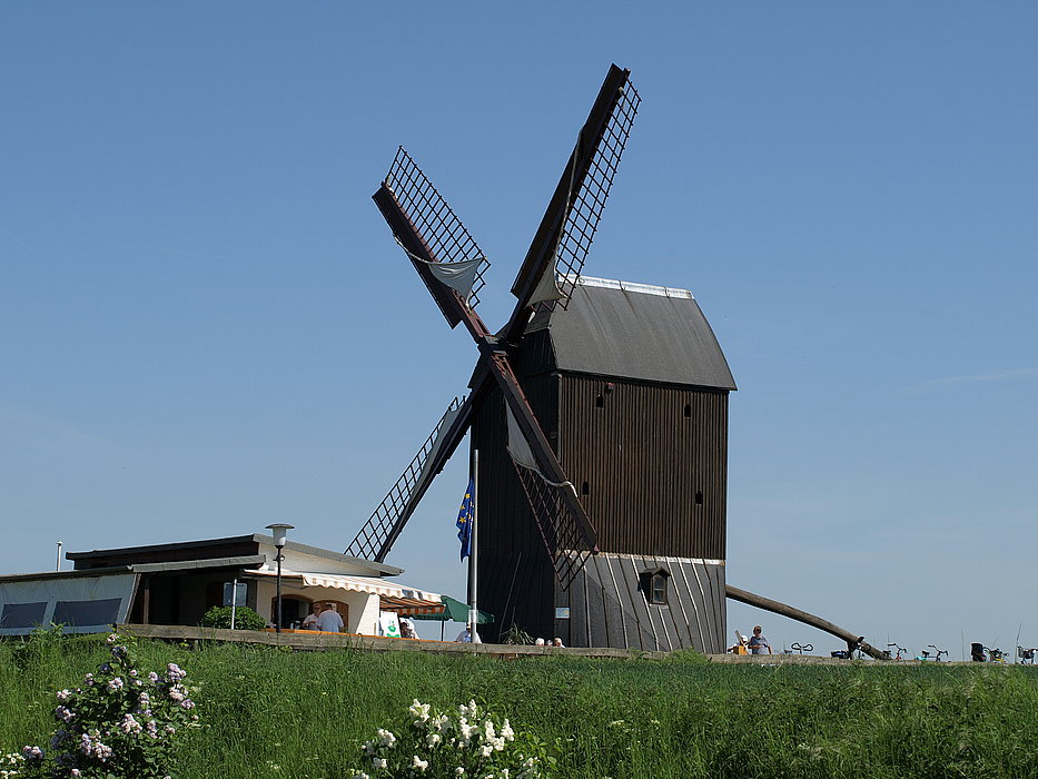 Windmühle zu Asel am Deutscher Mühlentag 2008